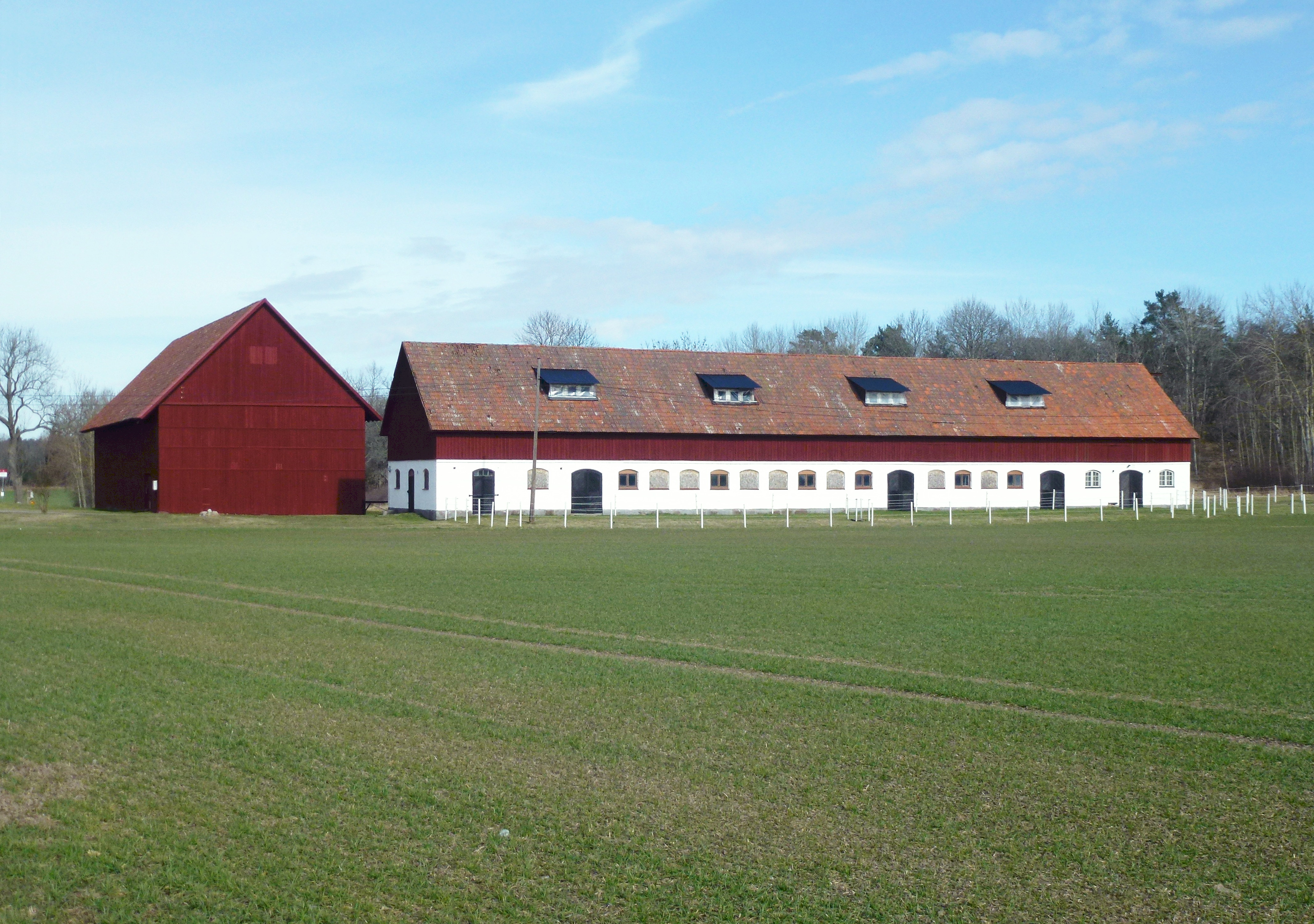 Tuna gård vid Skå kyrka på Färingsö